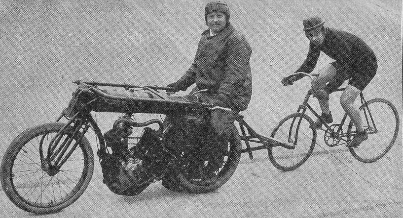 Fritz Theile, deutscher Radrennfahrer, letztes Foto vor seinem Tod 1911